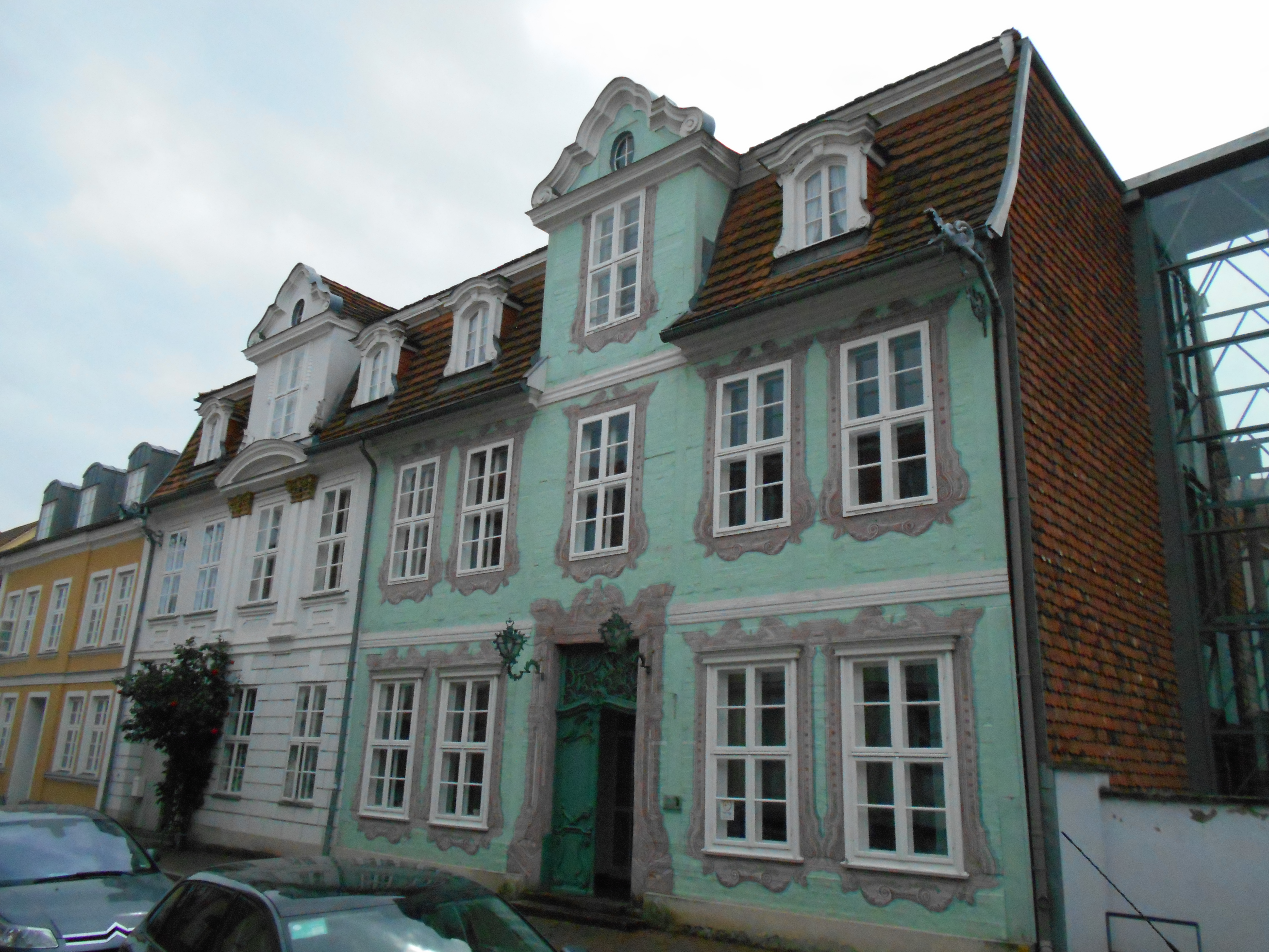 Haus der Kirche Güstrow Fassade